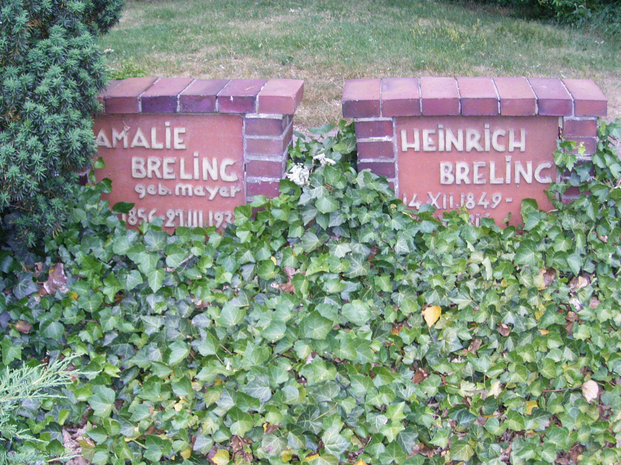 Grabstelle Amalie (1856-1938) und Heinrich Breling (1849-1914)